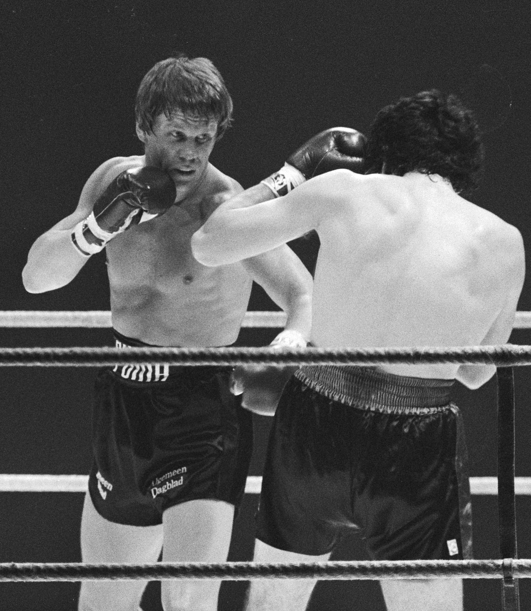 Europese Kampioenschappen boksen, Koopmans tegen Traversaro in Ahoy Rotterdam